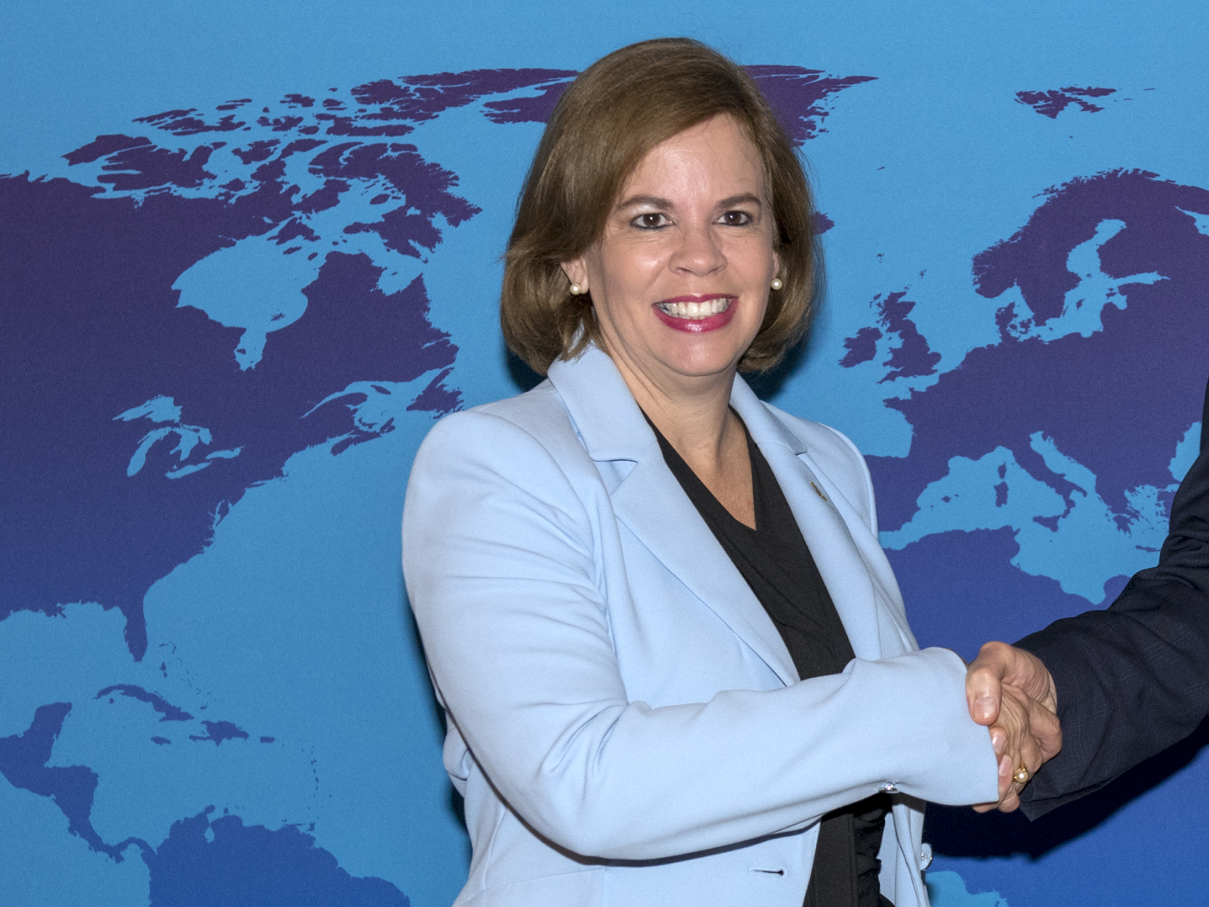 Minister Blok ontving vandaag op het ministerie de minister-president van Aruba, Evelyn Wever-Croes.